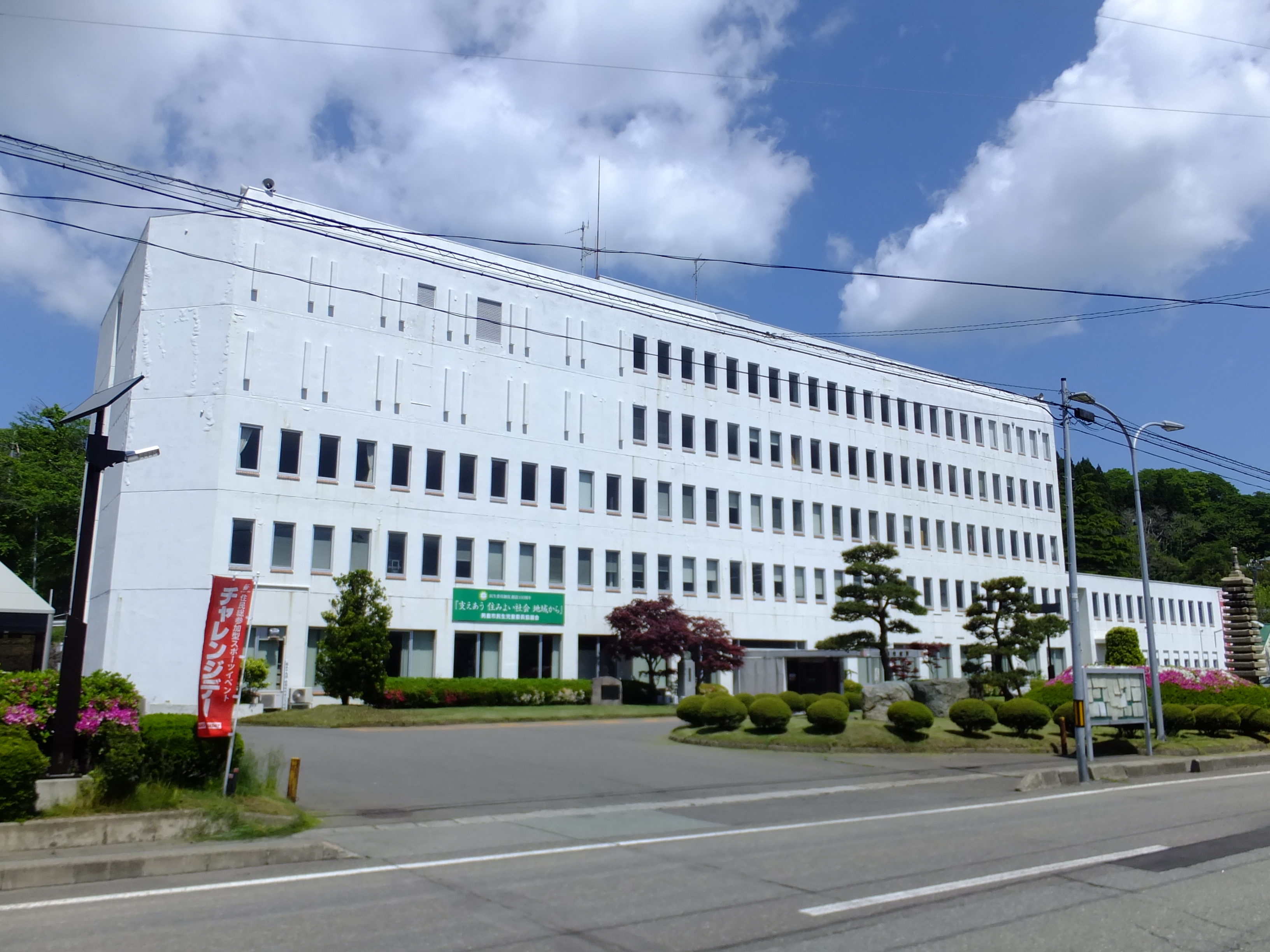 男鹿市役所本庁舎